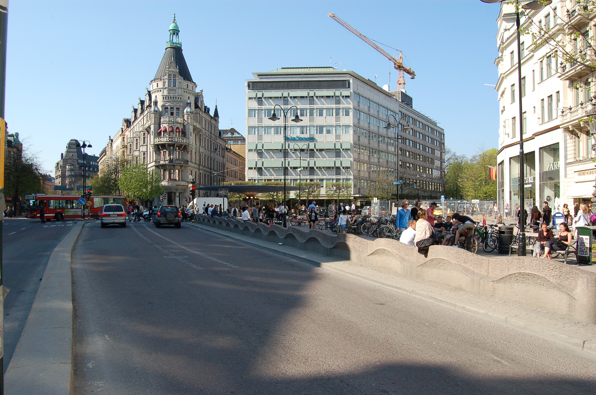 Stureplan i Stockholm från bussrefugen på Birger Jarlsgatan.